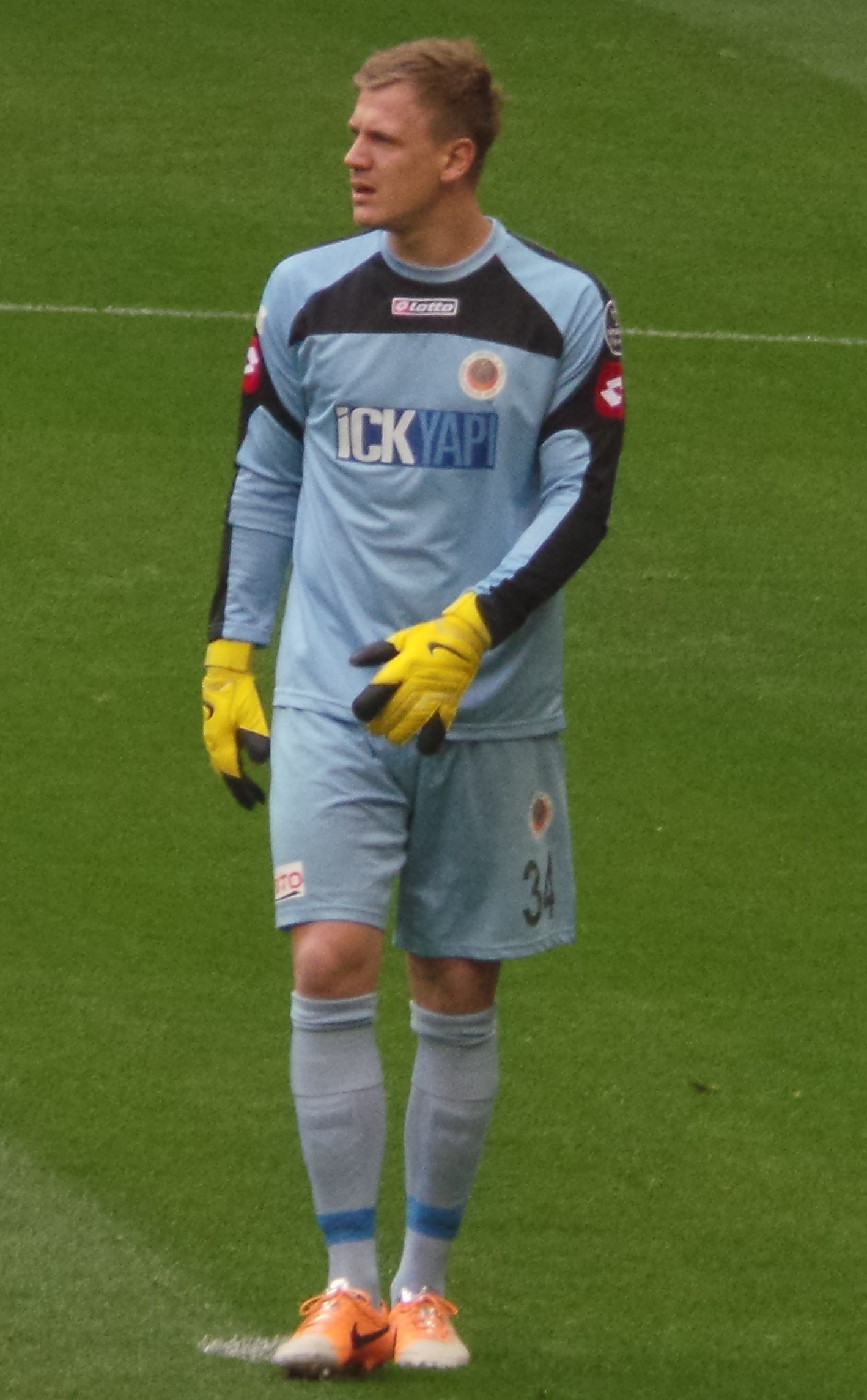 Johan Dahlin